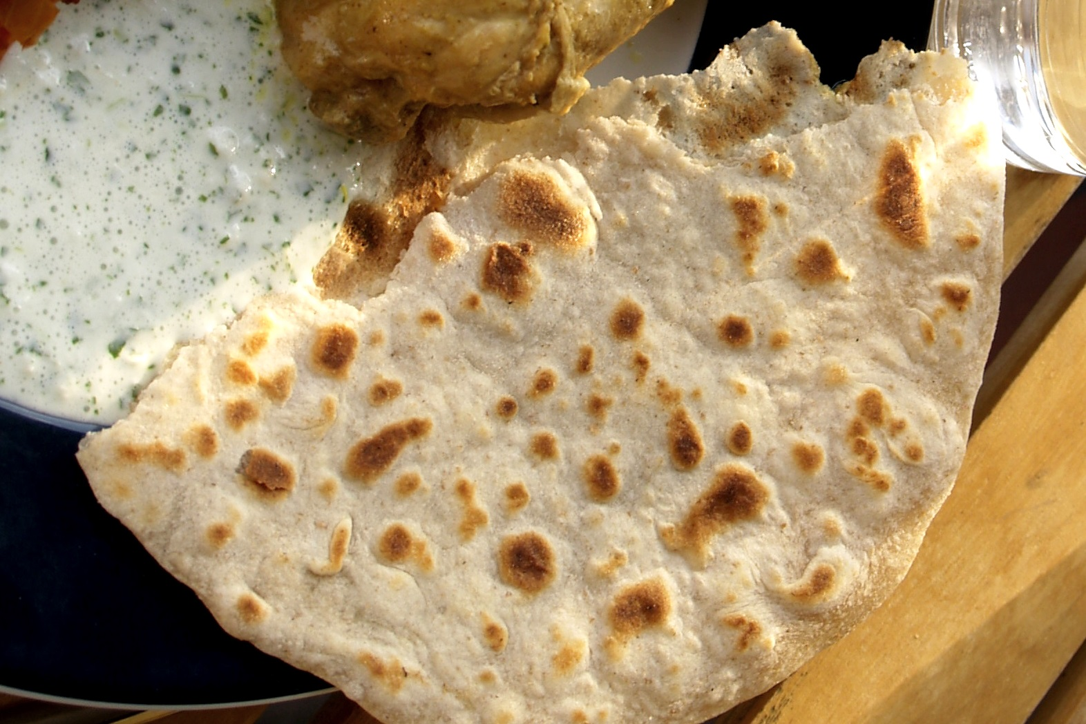 Chapati